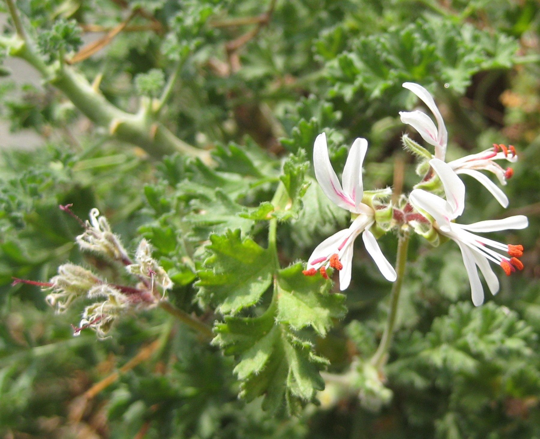 Pelargonium alternans im Botanischen Garten Dresden